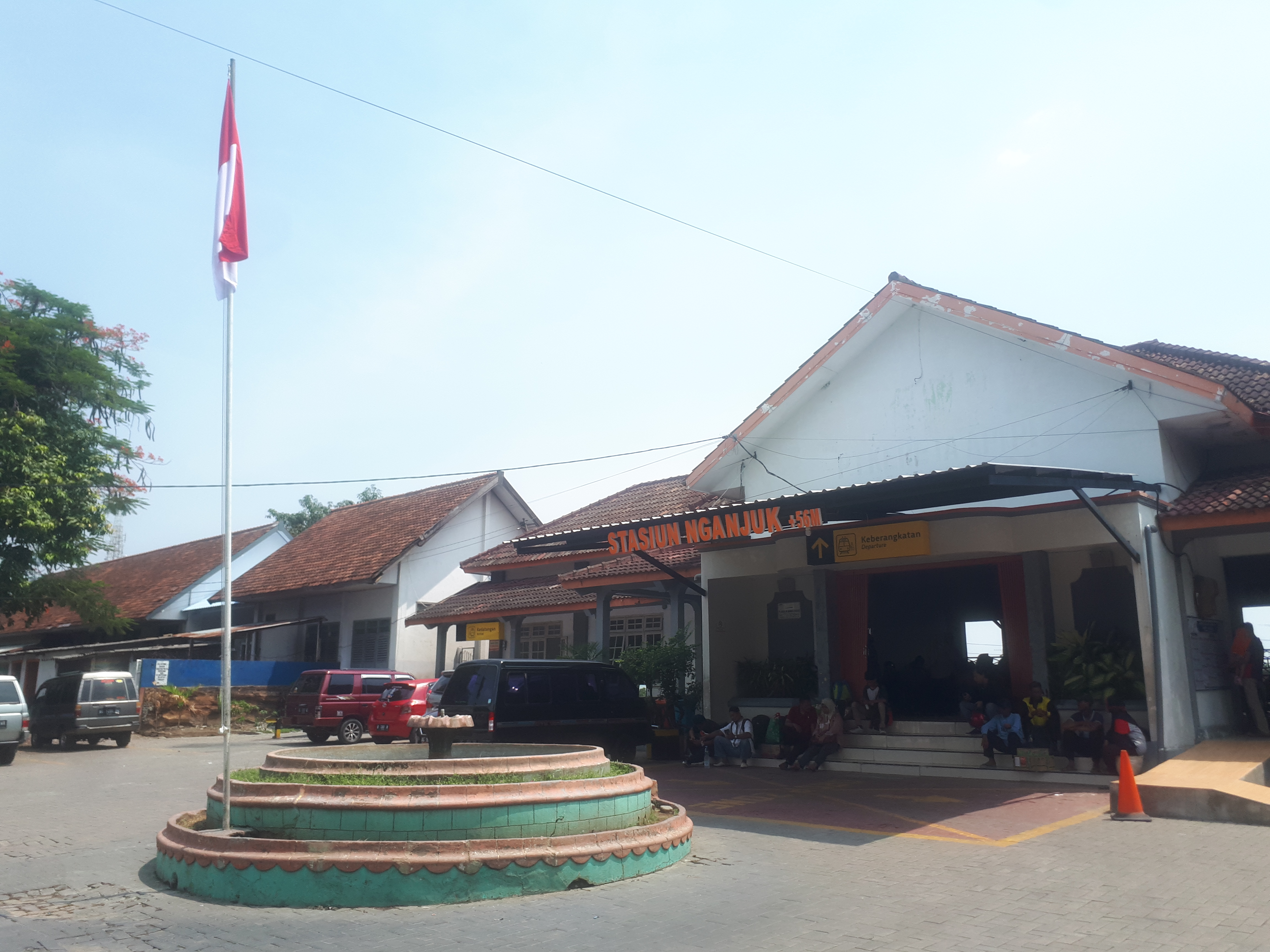 Stasiun Nganjuk pada tahun 2019.